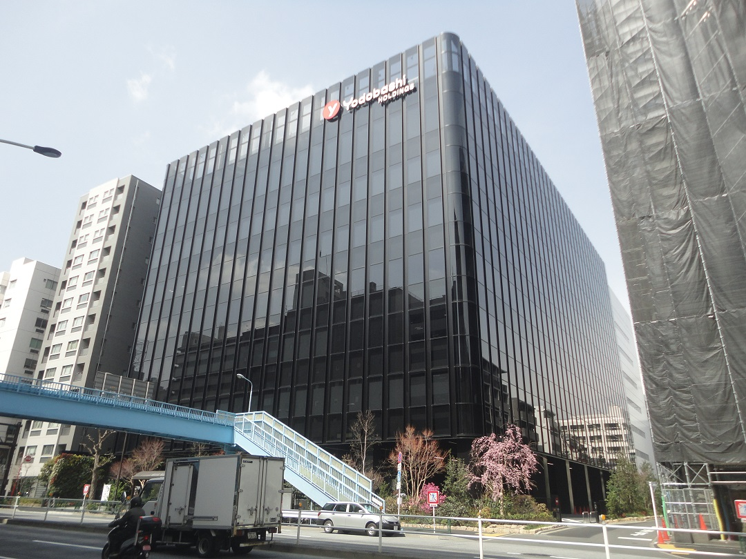 旧・東京厚生年金会館跡に建てられたヨドバシホールディングス本社ビル。